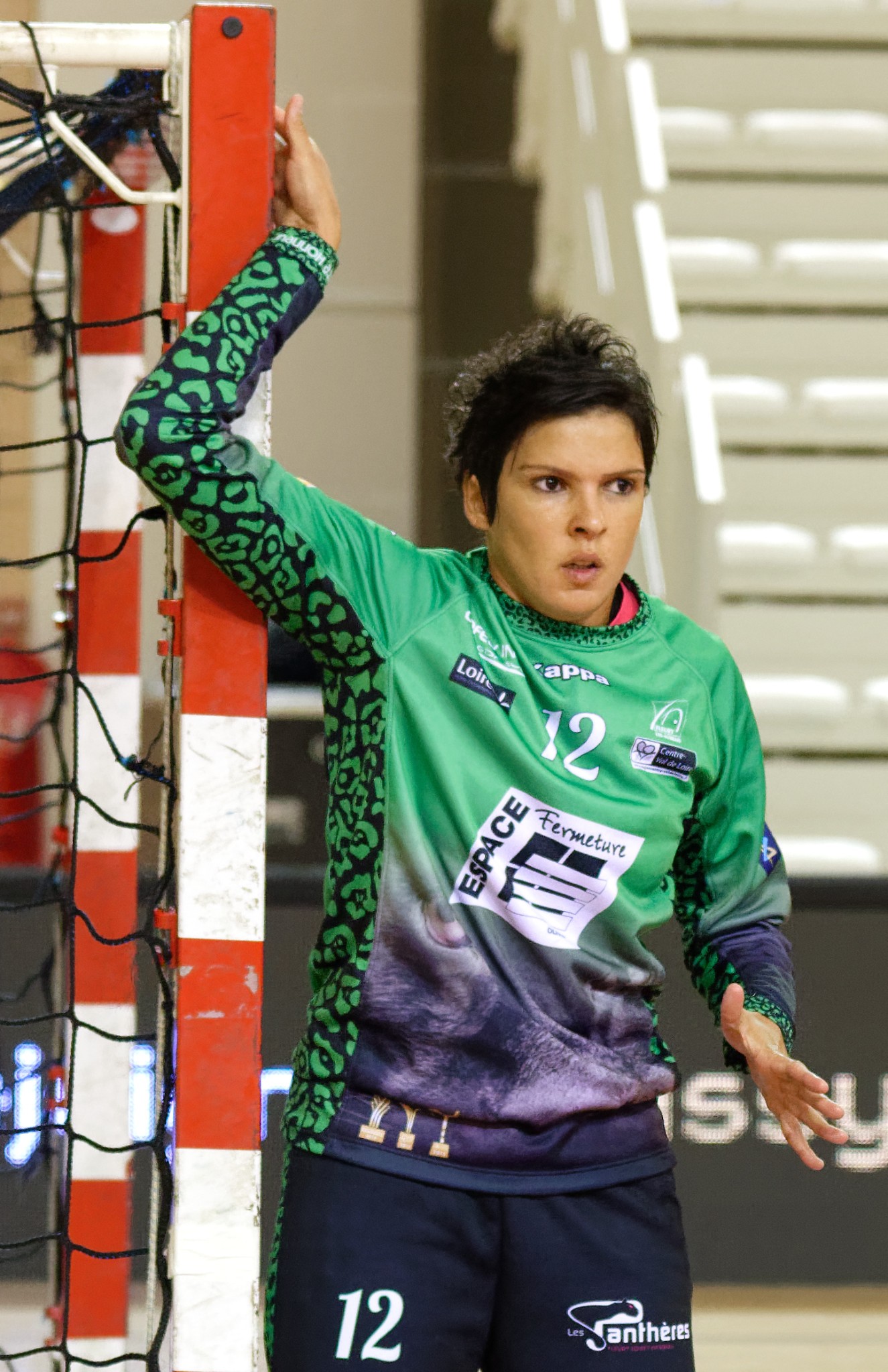 Rencontre de championnat entre Issy Paris Hand et fleury. A Issy Les Moulineaux, le 22 septembre 2015